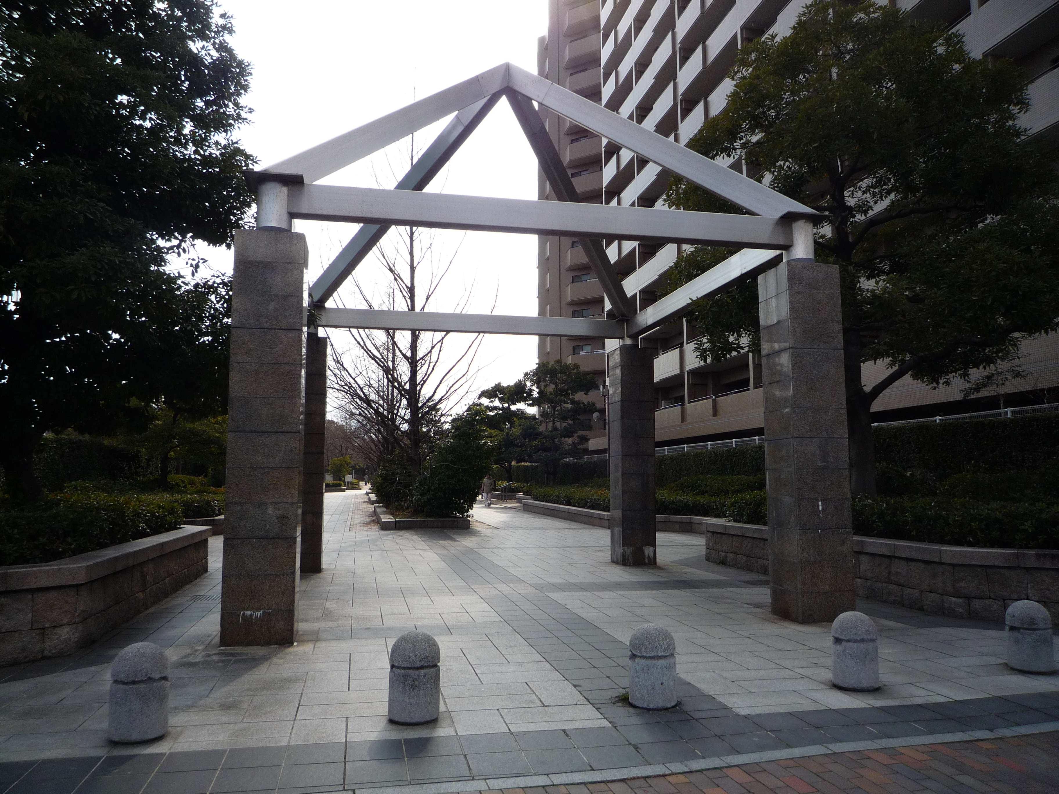 千田公園